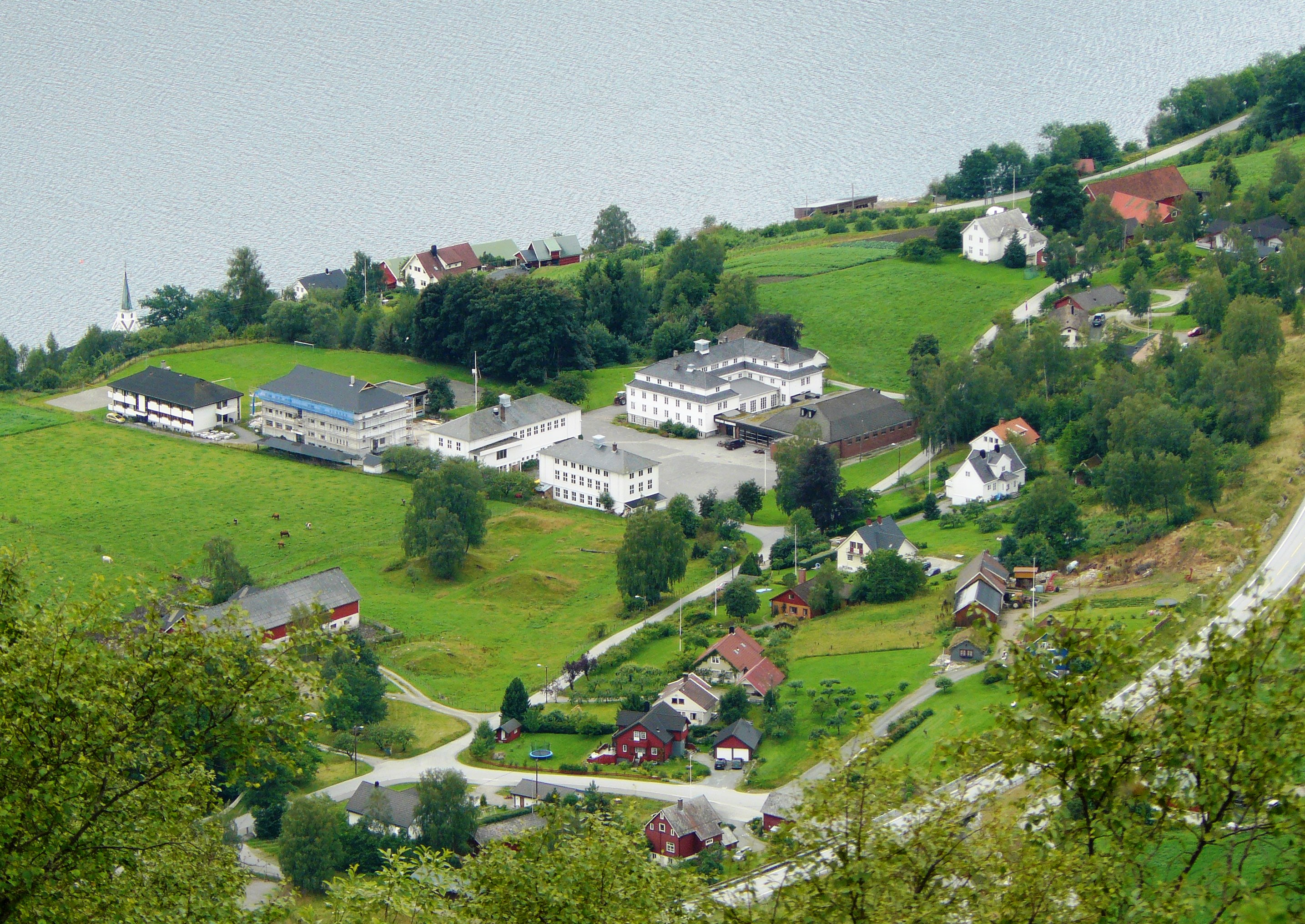 Nordfjord folkehogskule